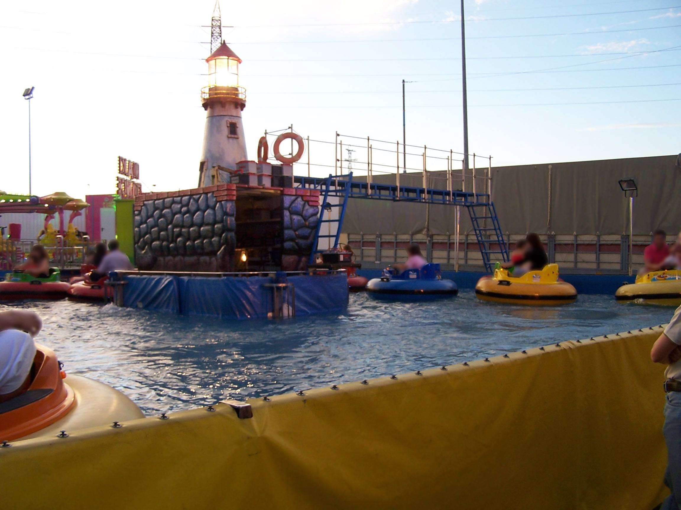 Es una atracción infantil de agua en la que los niños y sus padres dan vueltas alrededor del faro, una pena que yo no la tuviera de pequeño.